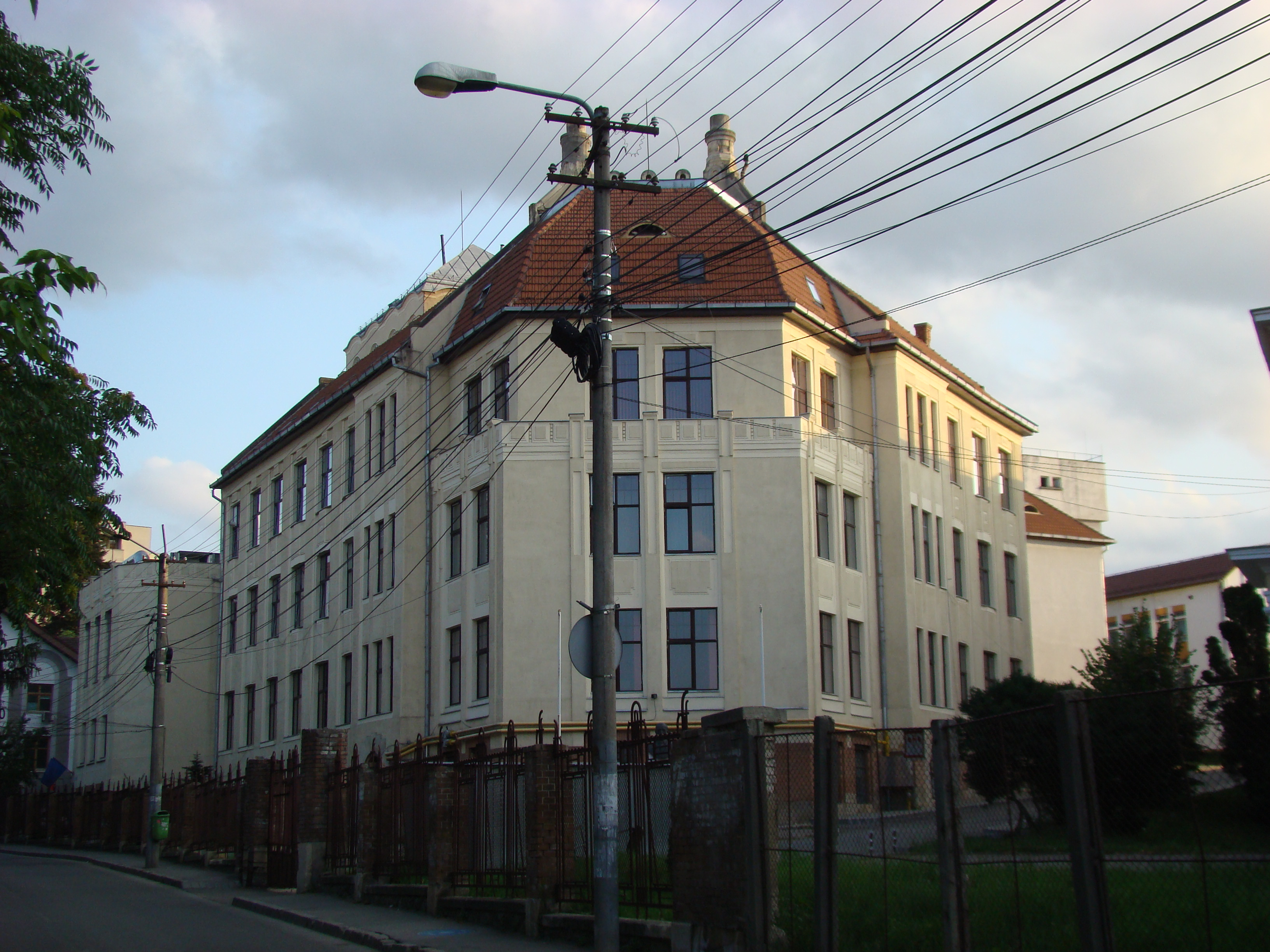 Clădire monument istoric, str. Pasteur, nr.6